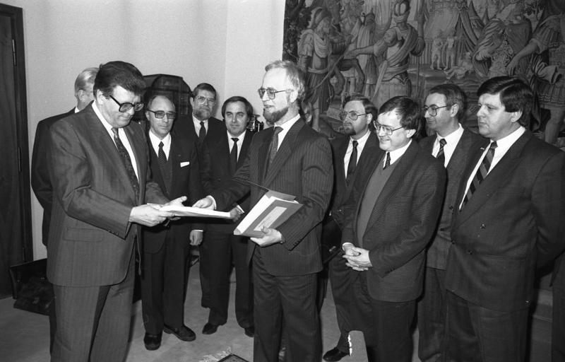 19.1.1987 Der Vorsitzende der vom Bundestag eingesetzten Enquete-Kommission "Chancen und Risiken der Gentechnologie", Minister des Bundestages Wolf-Michael Catenhusen (SPD), übergibt dem Präsidenten des Deutschen Bundestages, Dr. Philipp Jenninger (links), den Abschlußbericht der Kommission im Bundeshaus.